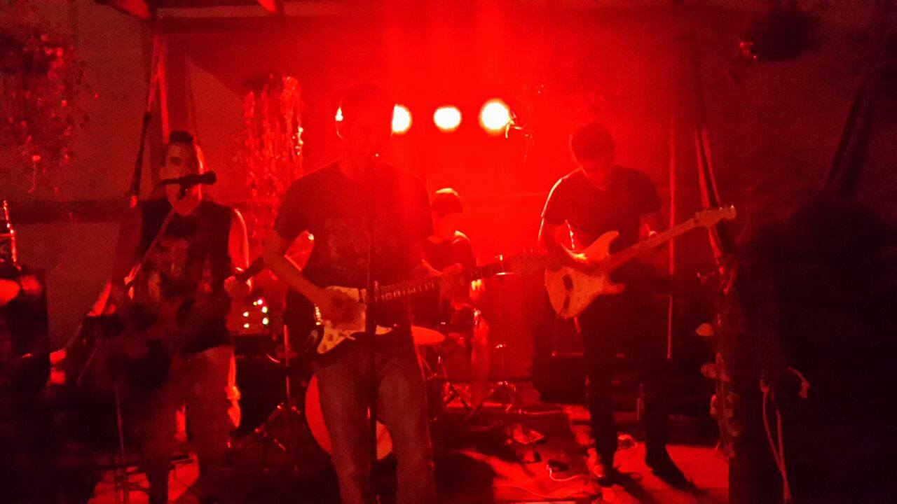 Volumen en La Hamaca el 23 de enero de 2015